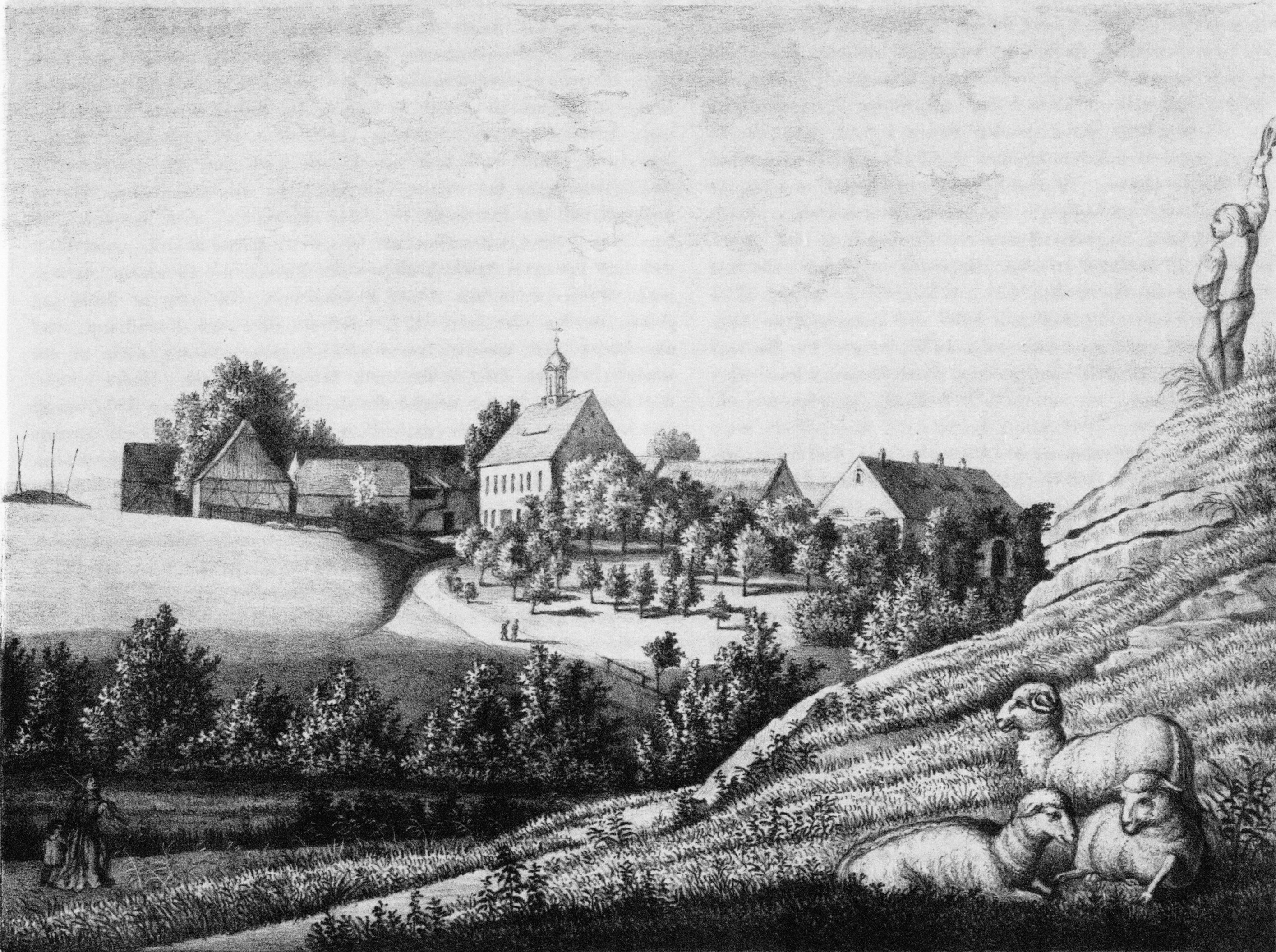 Lehndorf aus: Album der Rittergüter und Schlösser im Königreiche Sachsen Markgrafenthum Oberlausitz Section: III